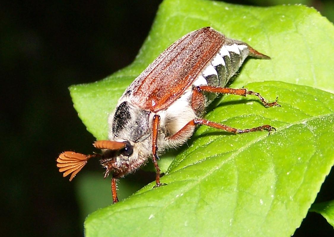 Maikäfer (wahrscheinlich Feldmaikäfer, Melolontha melolontha L.)